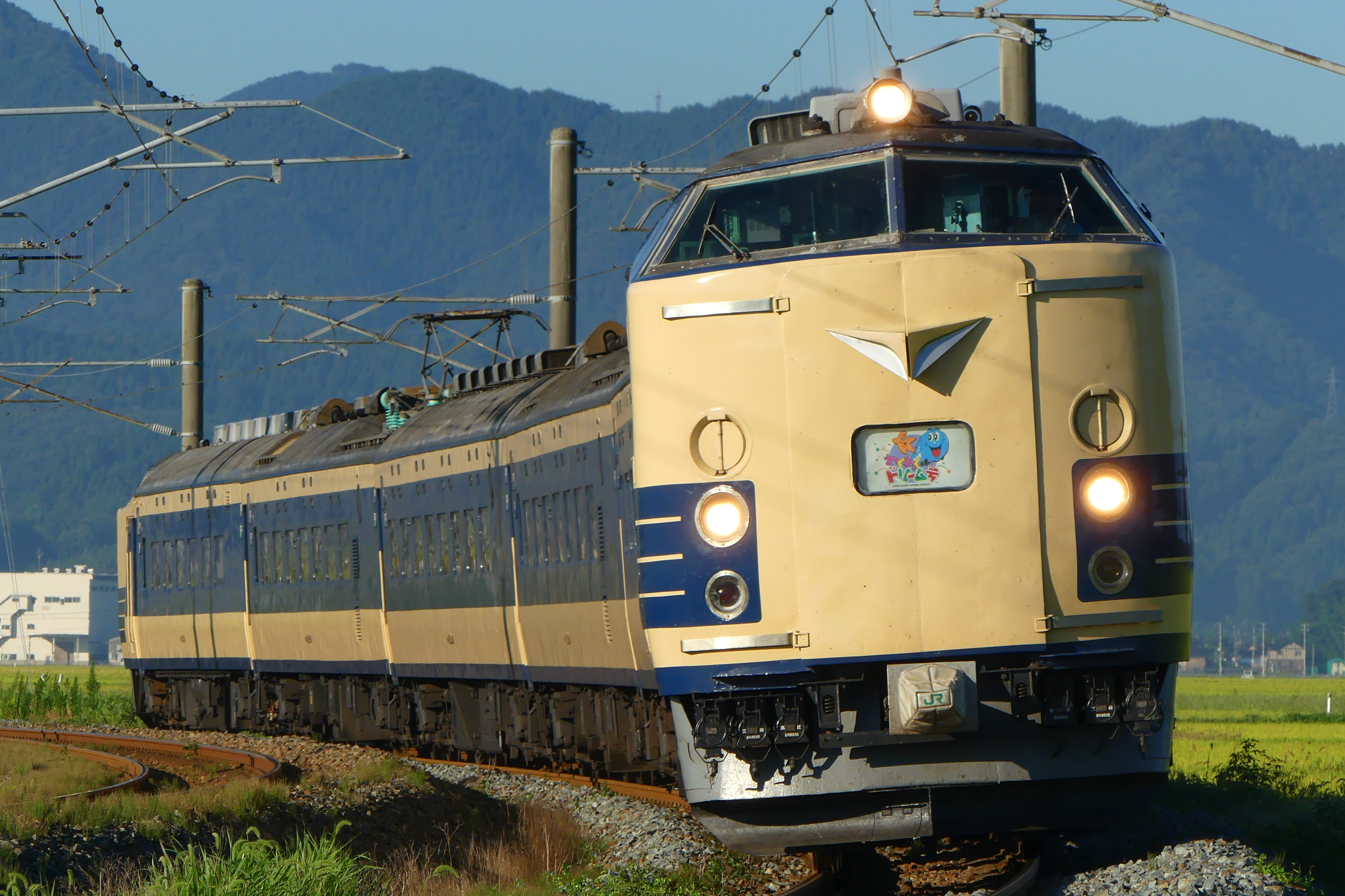 583系電車(羽前大山)